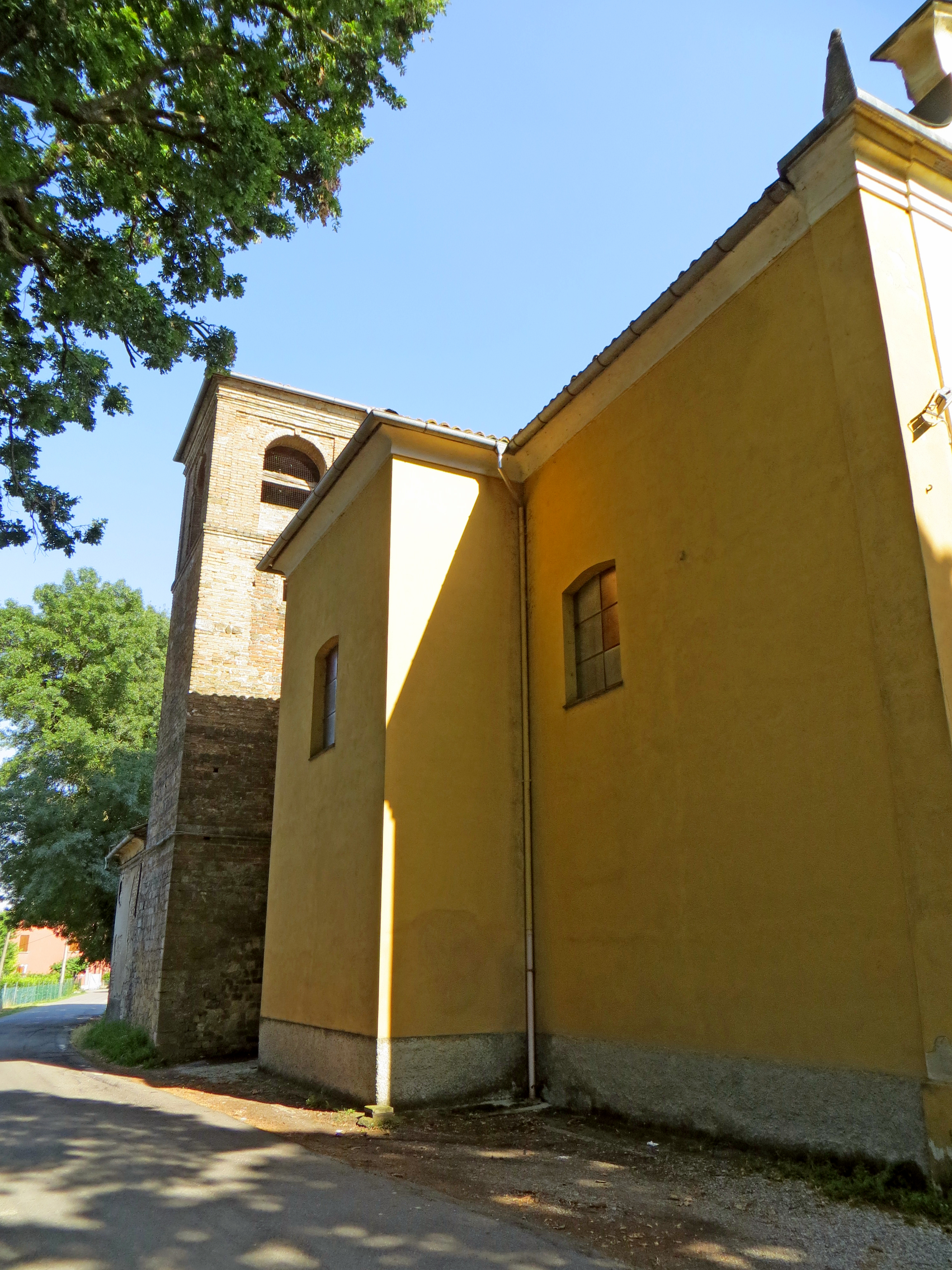 Chiesa di San Giovanni Evangelista (Vigolante, Parma) - lato nord e campanile